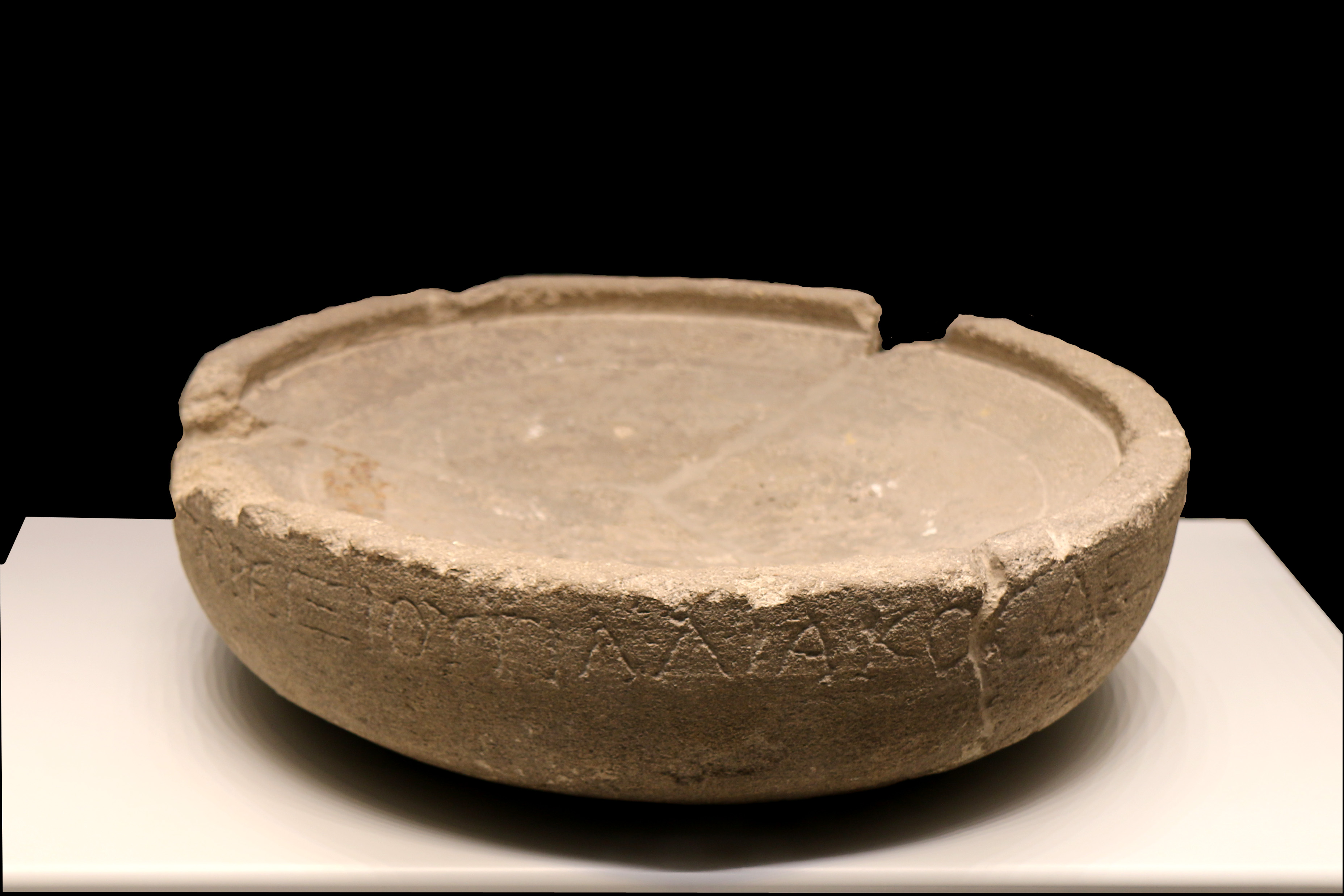 Vasque dédiée au dieu gaulois Bélénos exposée au musée d'histoire de Marseille.